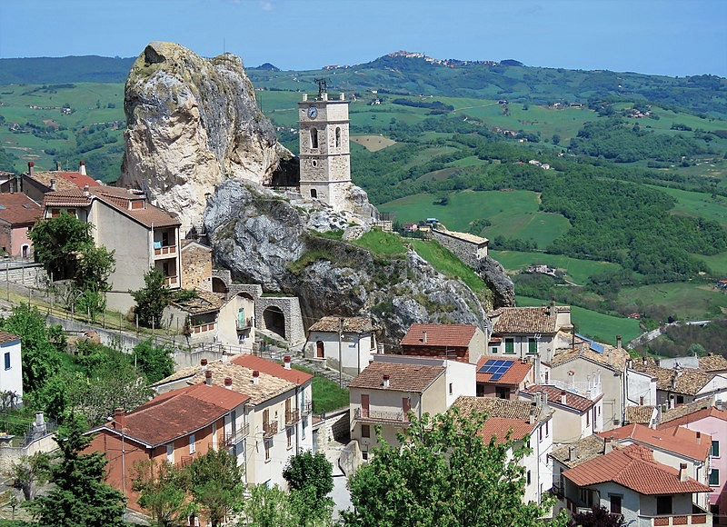 Pietracupa